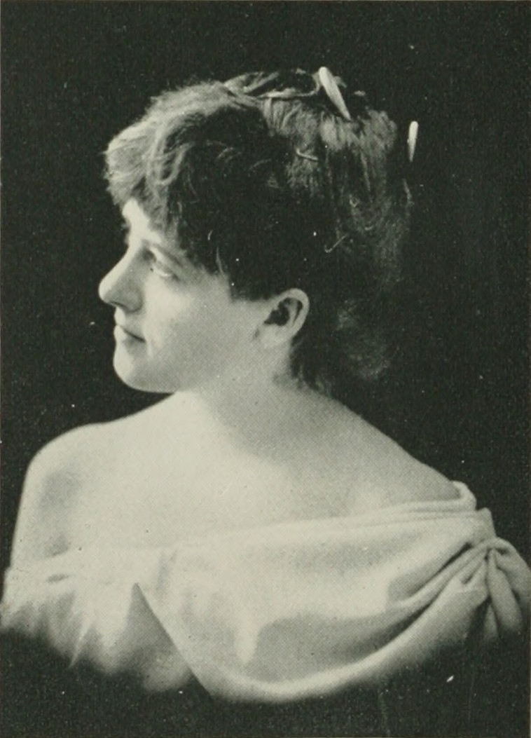 Helen Corinne Bergen